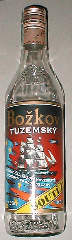 Bottle of Czech Tuzemský(Rum)